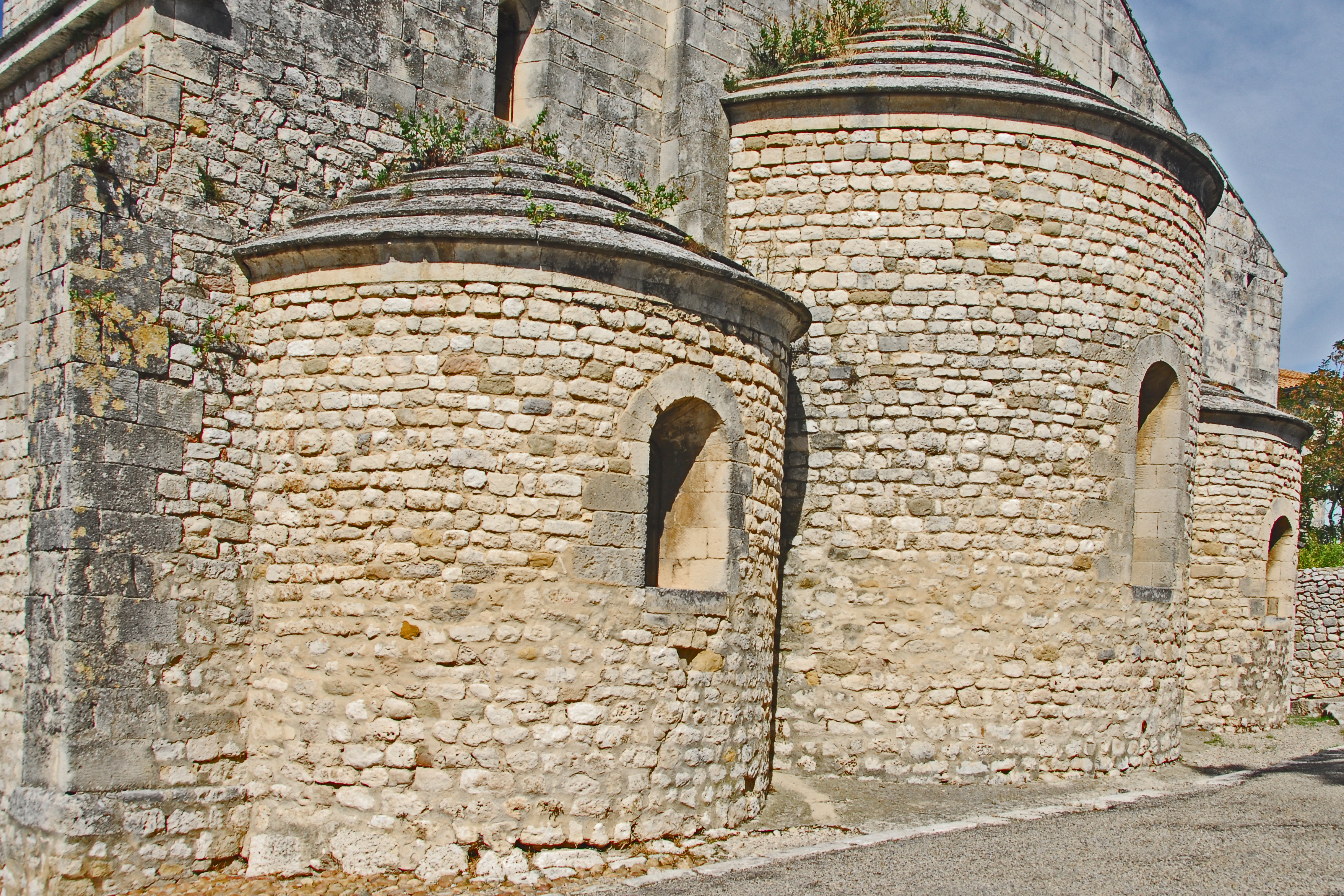 St-Michel de La Garde- Adhémar, Chorhaupt